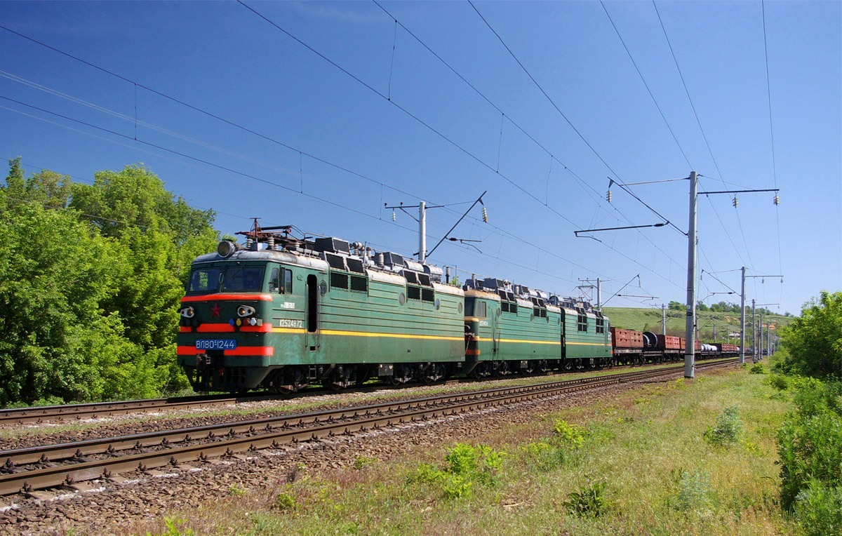 Электровоз ВЛ80С-1244, в составе трёх секций, с поездом